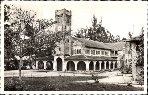 La mission catholique de Port-Gentil - Afrique Equatoriale Française